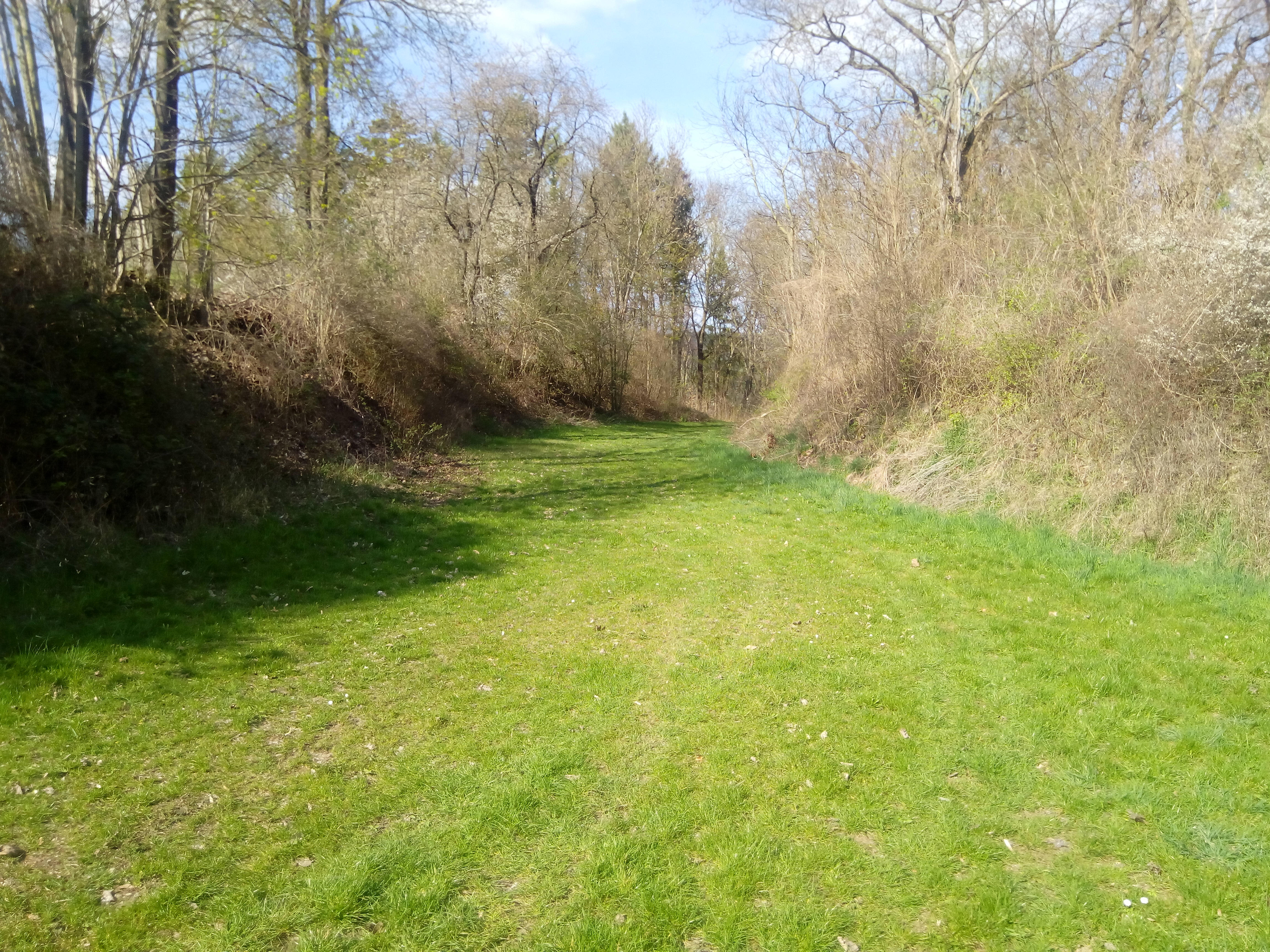 Burg Schüpf, oberer Graben